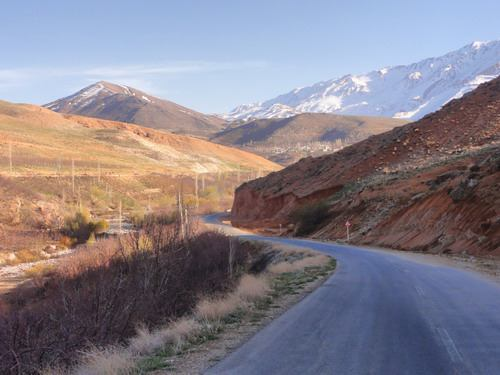 کوه سفید پوشیده از برف: کوه دنا ، کوه هرمی شکل تیره: کوه سیاه، کوه کوچک جلو آنها: تخت، تپه های بی پوشش سمت چپ: موردراز و رود خانه زیر جاده: رودخانه ی سرد است. روستای نقل در دشت زیرین تخت است.